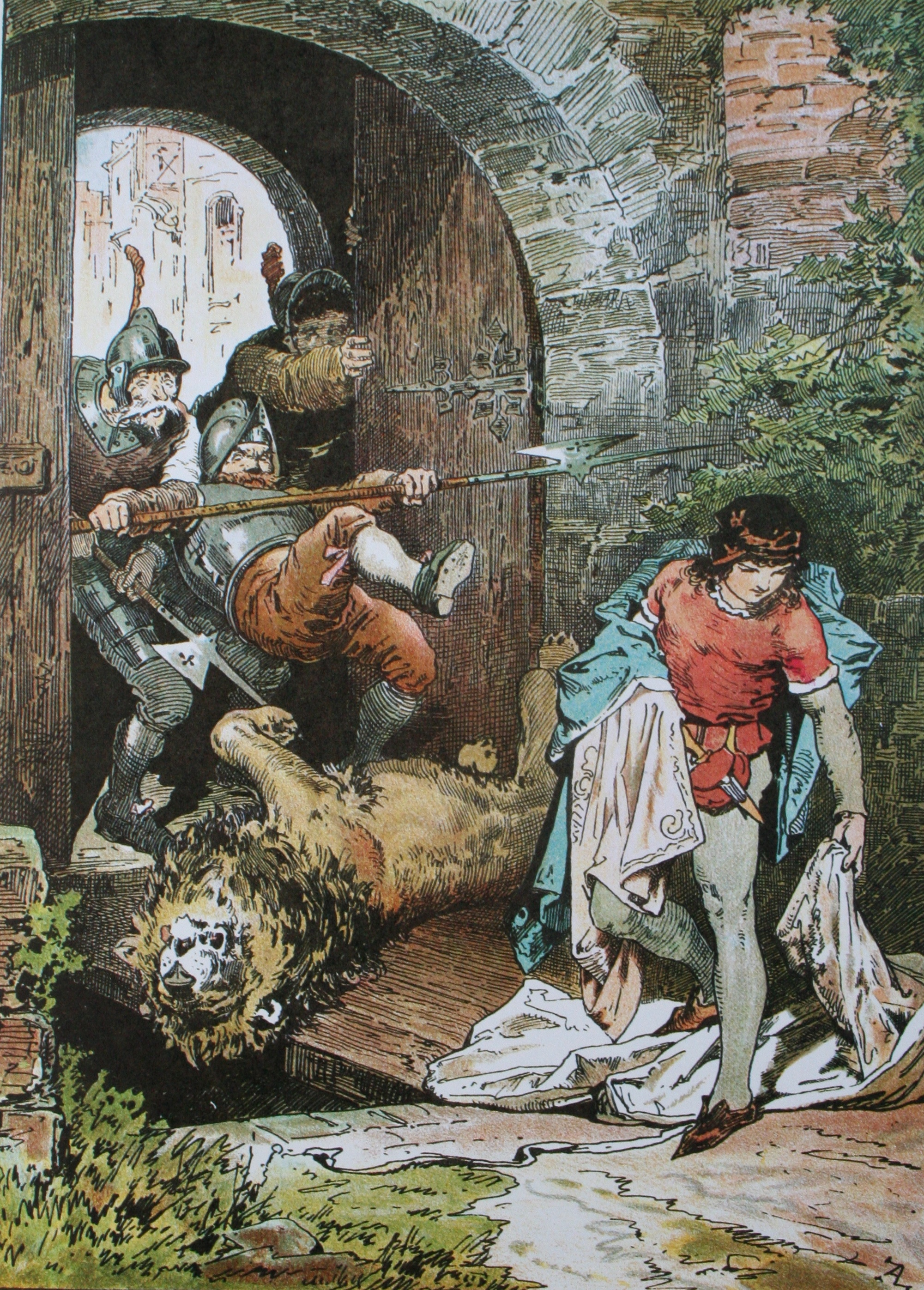 Das Märchen vom Witzenspitzel; Darstellung von Alexander Zick (1845 - 1907)